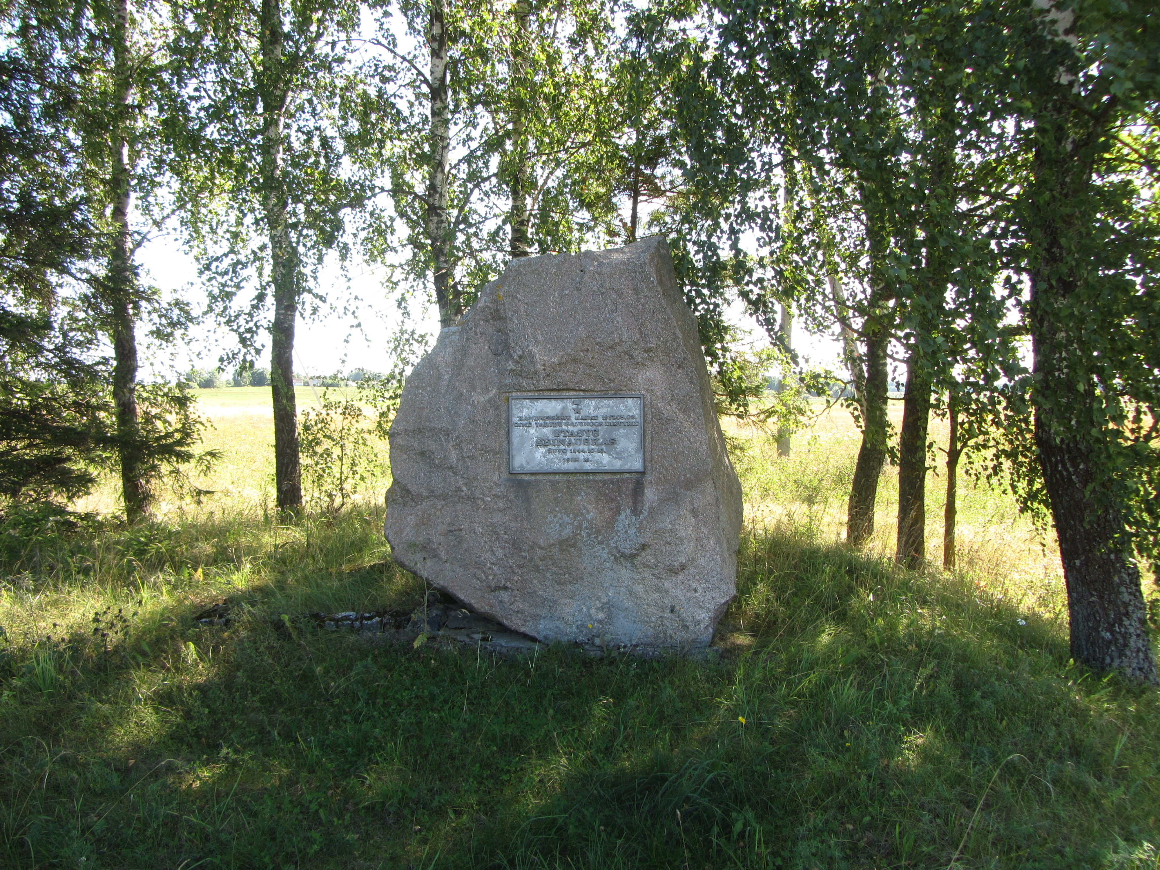 Skapiškio sen., Lithuania